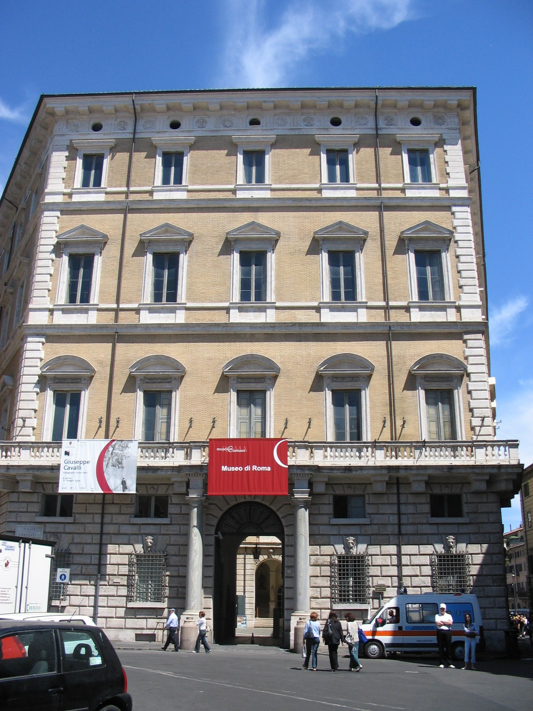 Roma, Palazzo Braschi. Facciata principale su piazza di S. Pantaleo (Corso Vittorio)